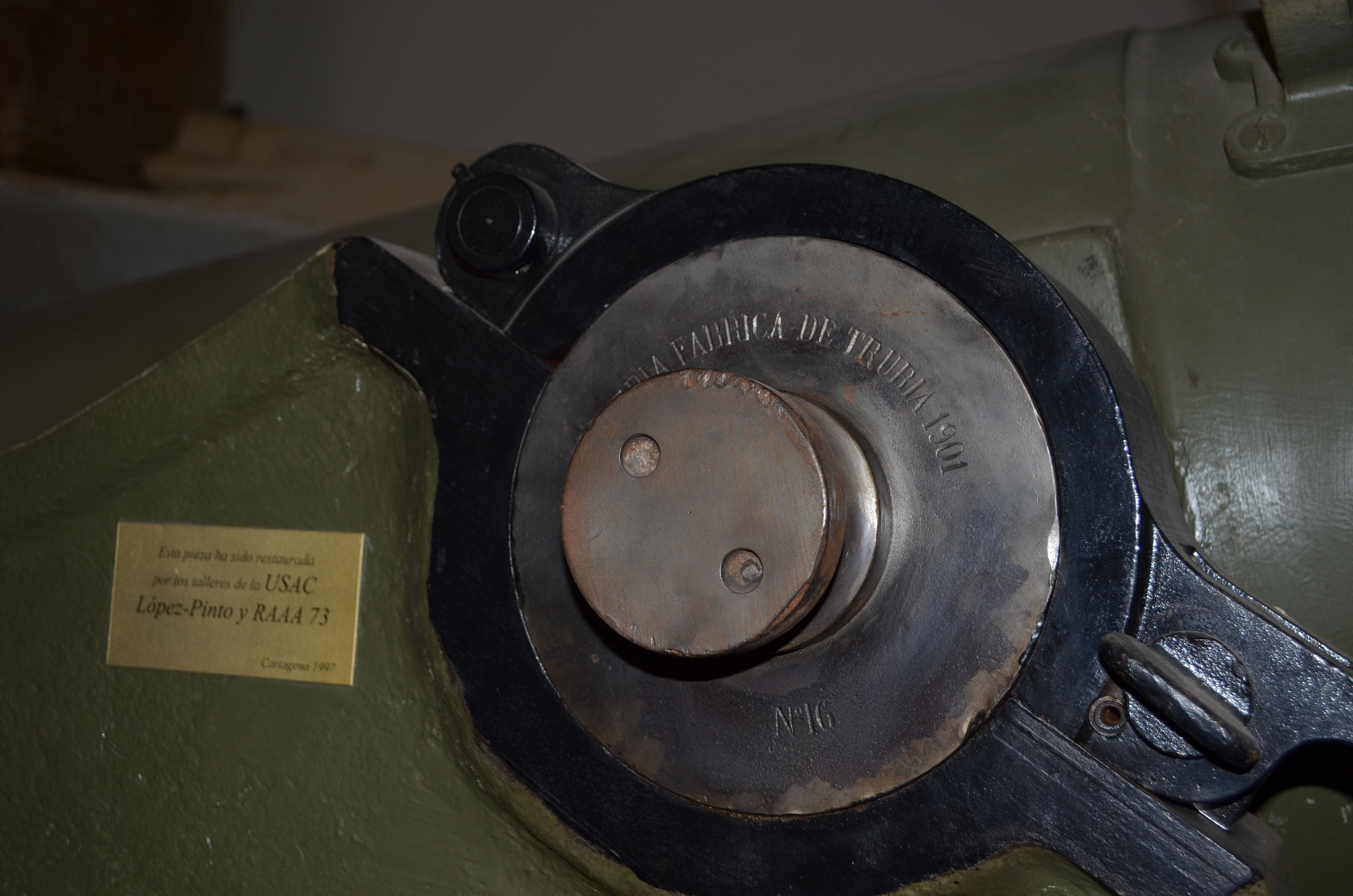 Muñón derecho